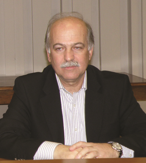 Ο Γιώργος Φλωρίδης σε παρουσίαση βιβλίου στην Κομοτηνή το 2011.